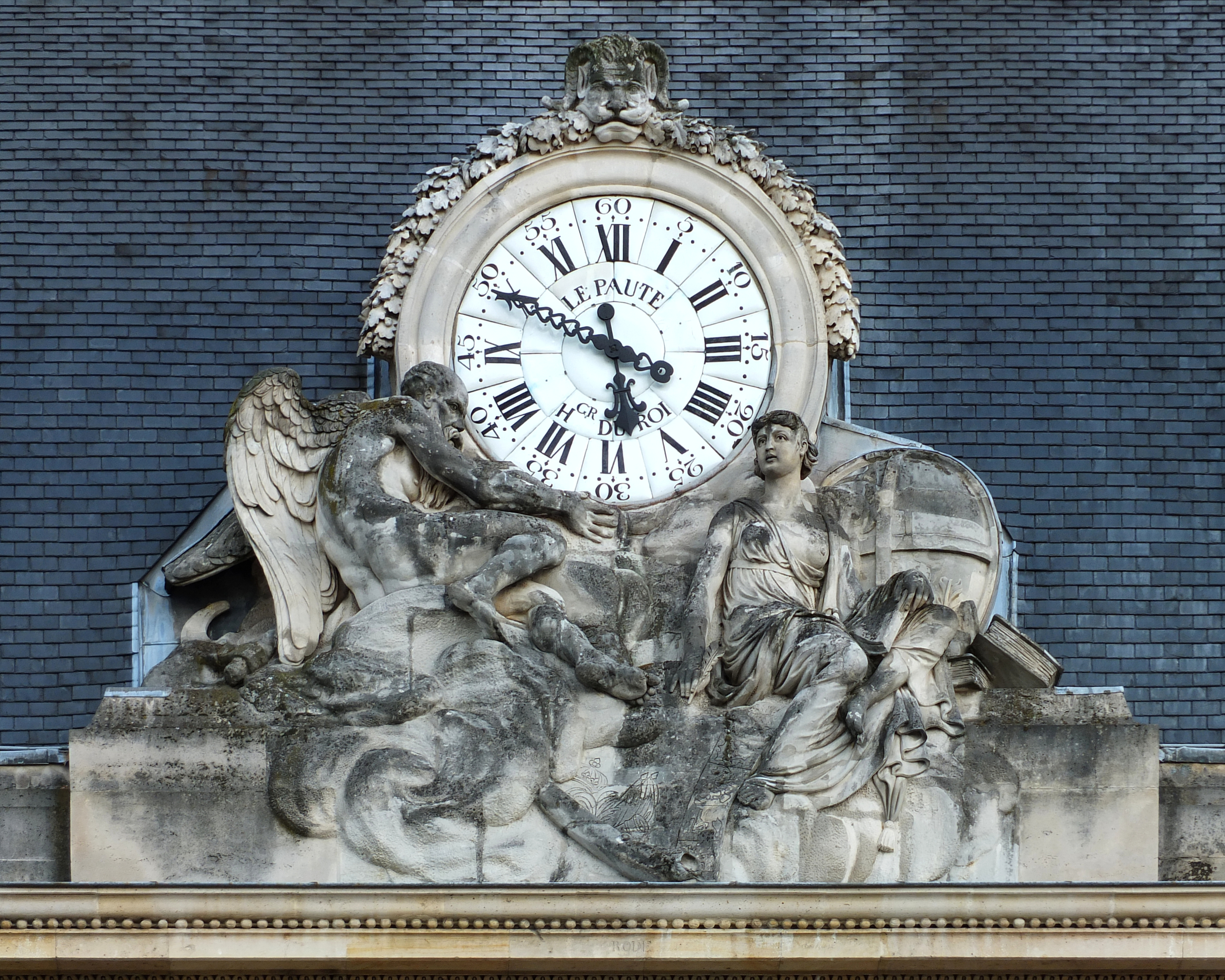 Horloge publique de la façade principale de l'école militaire à Paris (7e arrond.). Jean-André Lepaute, horloger du roi, sculpteur Rode (?).